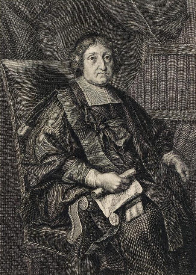 Portrait de Pierre Danet, gravure à l'eau forte.